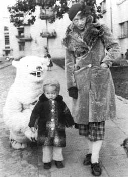 Katarzyna Kobro (ur. 26 I 1898, zm. 21 II 1951), rzeźbiarka związana z Łodzią. Na zdjęciu z córką Niką obok domu, w którym mieszkała na osiedlu Montwiłła-Mireckiego (ul. Srebrzyńska 75) – jesień 1938.